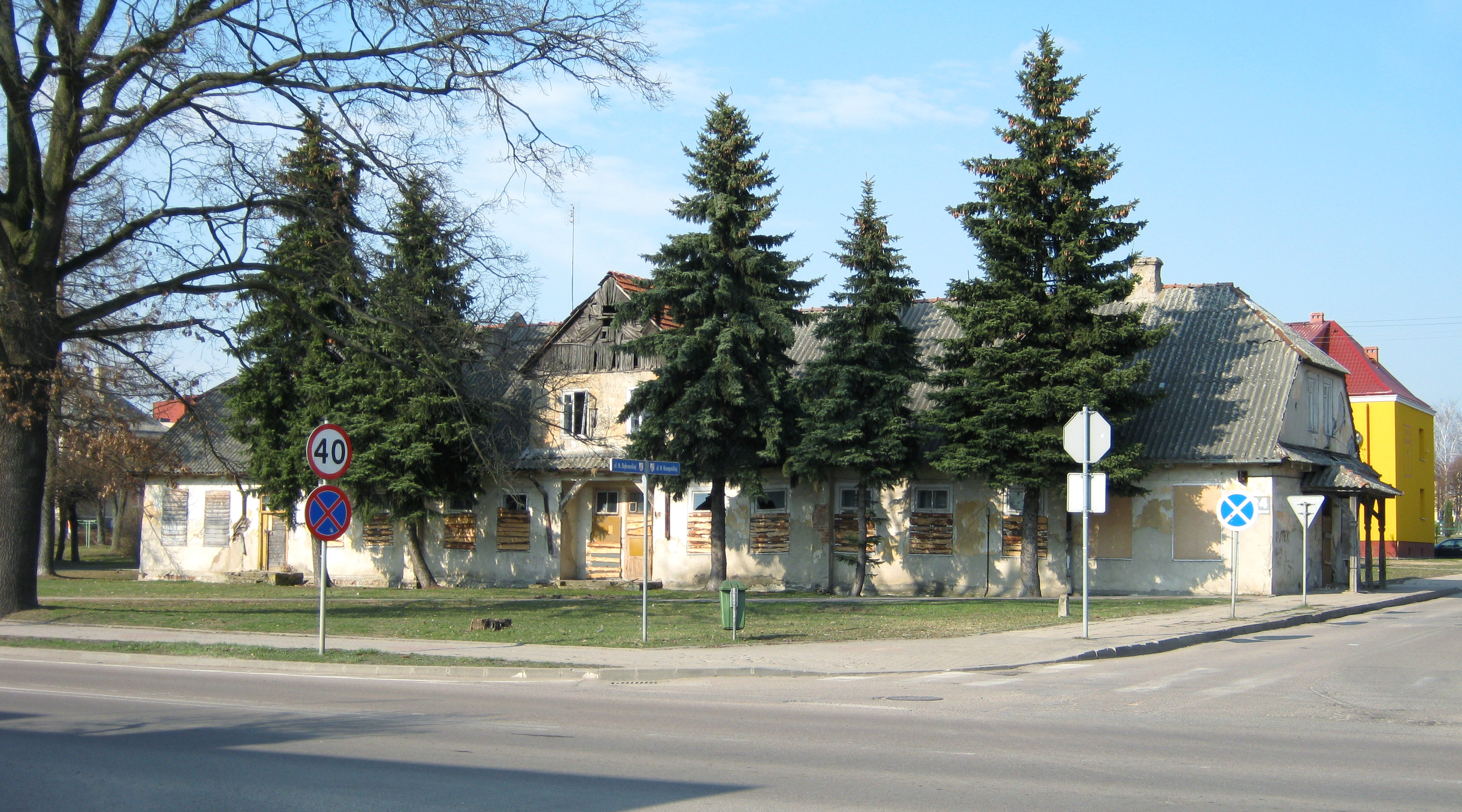 Budynek "ochronki" w Kolnie z 1919 roku. Zburzony w marcu 2014 r.